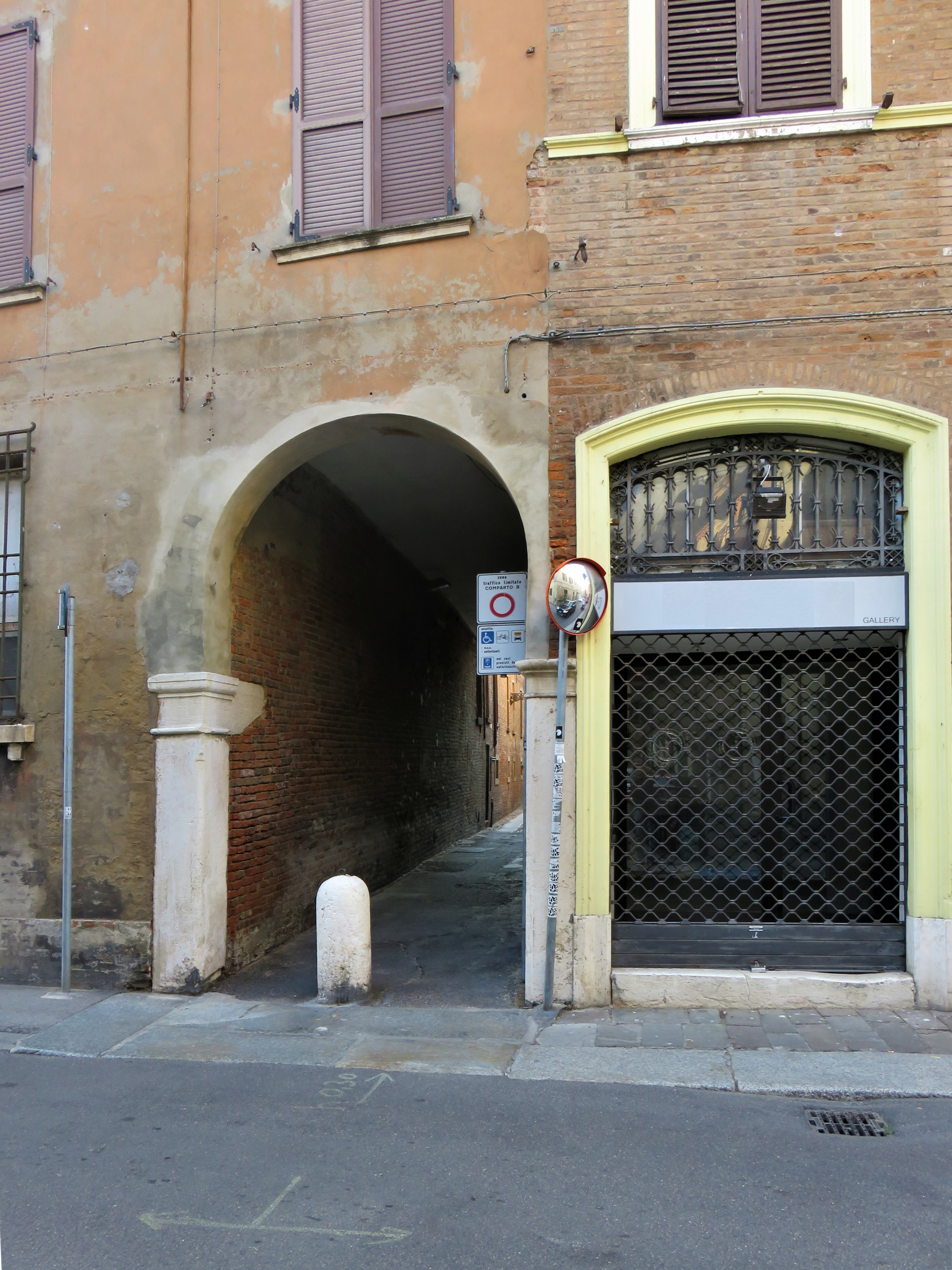 Volto di accesso da via Terranuova